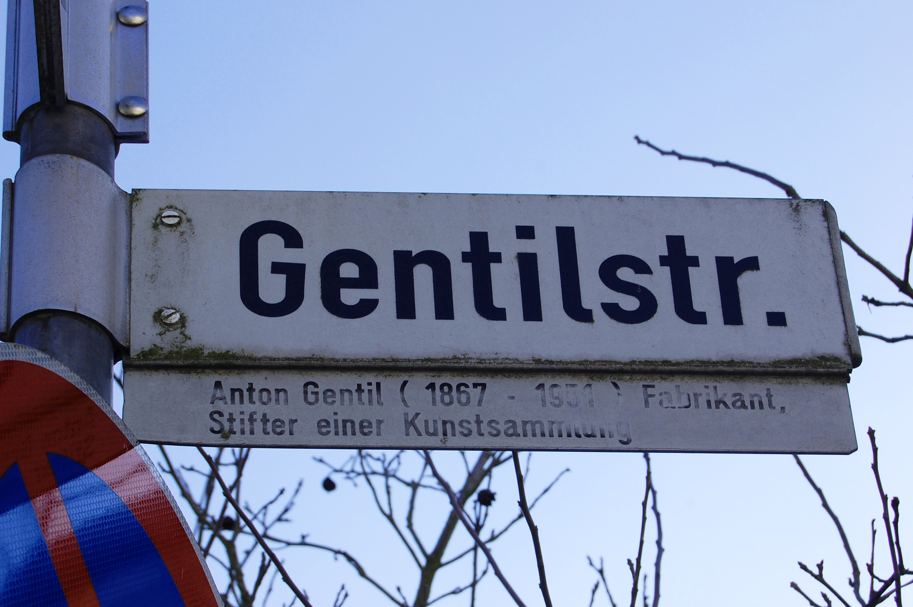 Schild Geltilstraße